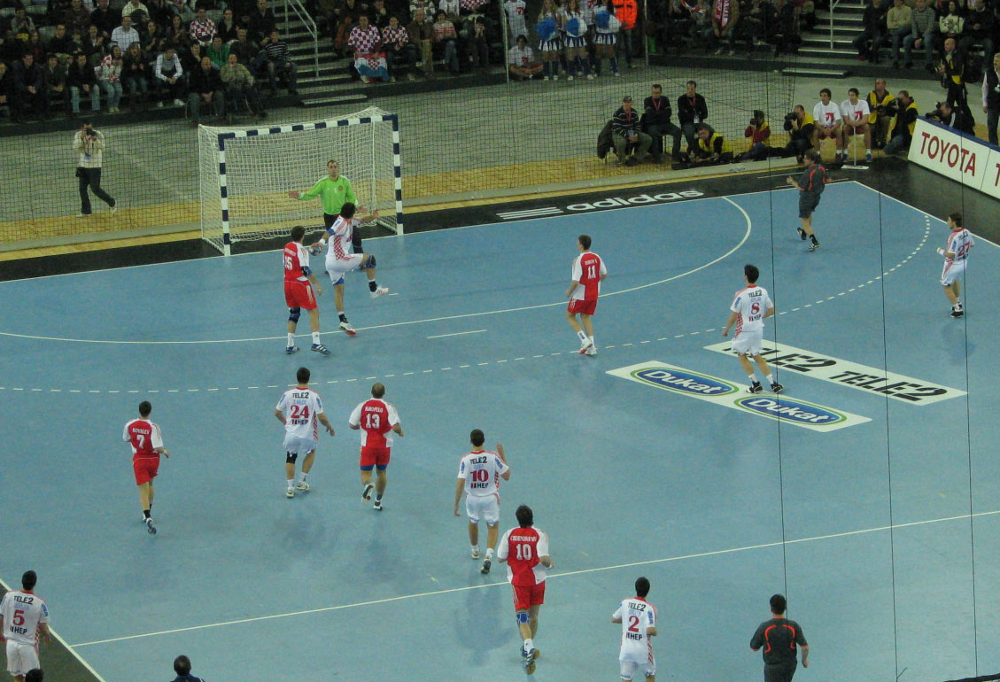 Igor Vori daje prvi gol u Areni Zagreb na rukometnoj utakmici Hrvatska-Rusija 27. prosinca 2008.